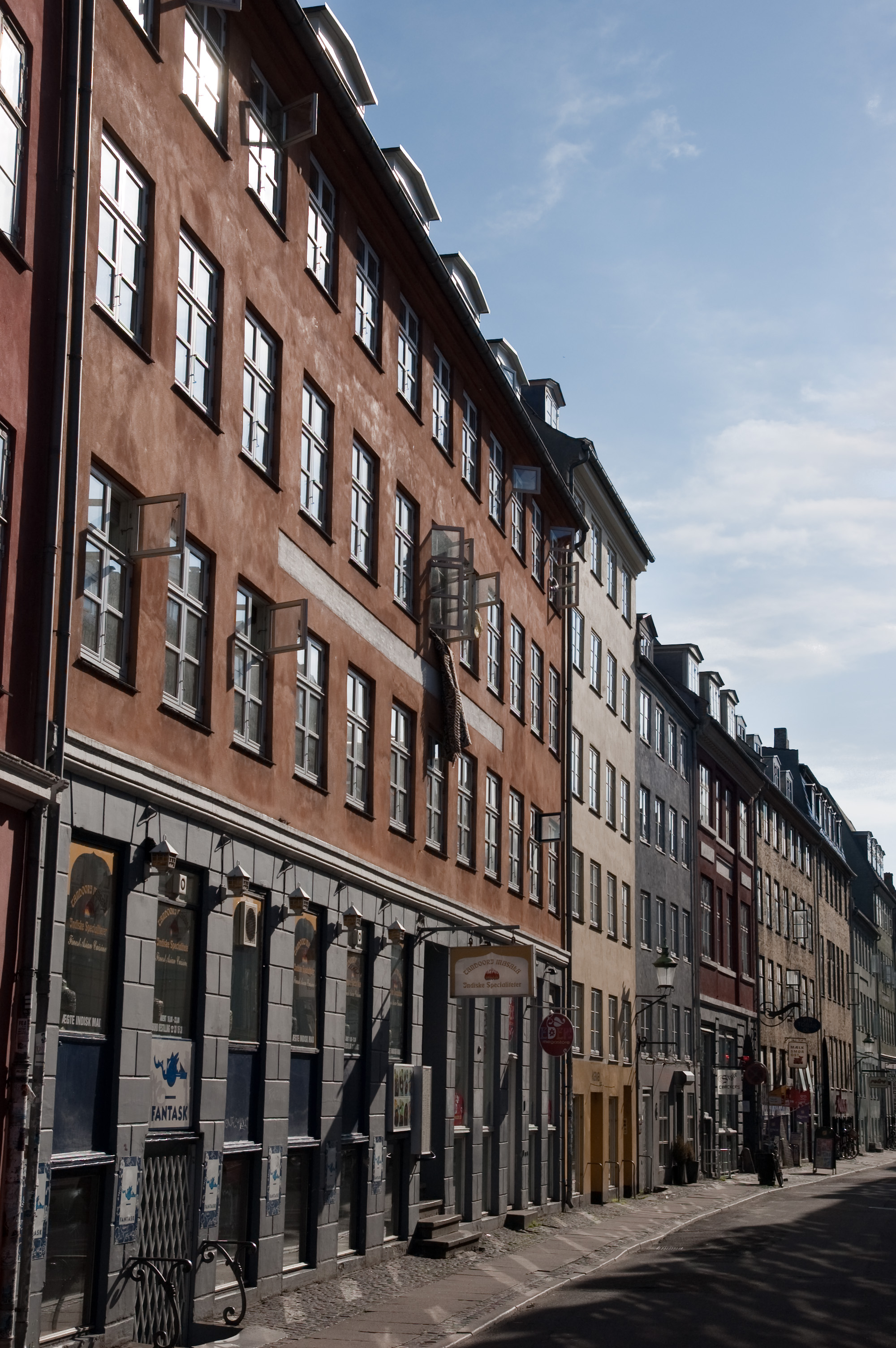 Sankt Peders Stræde in Copenhagen